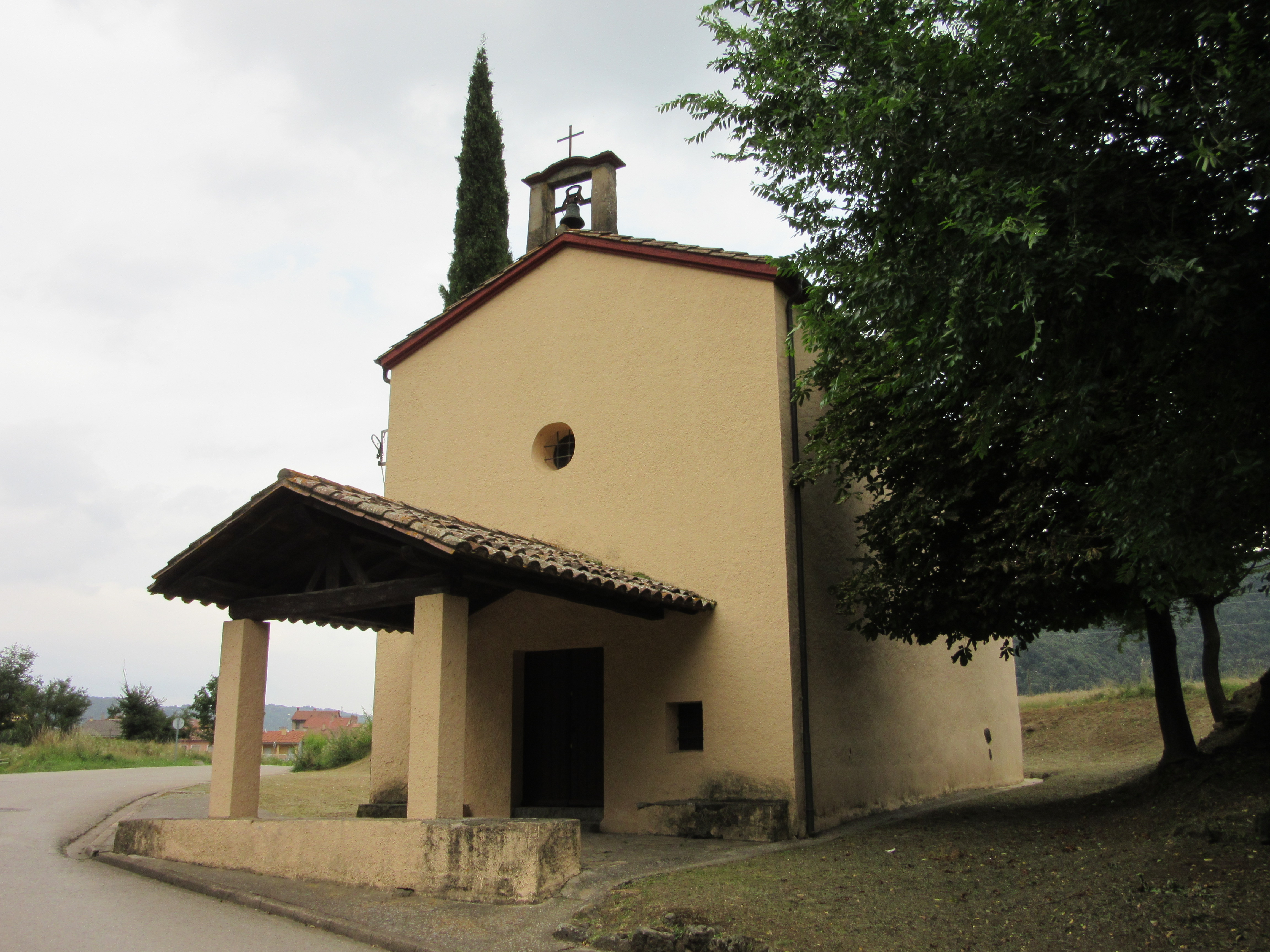 Capella de Nostra Senyora de l'Esperança, a La Canya (Garrotxa).